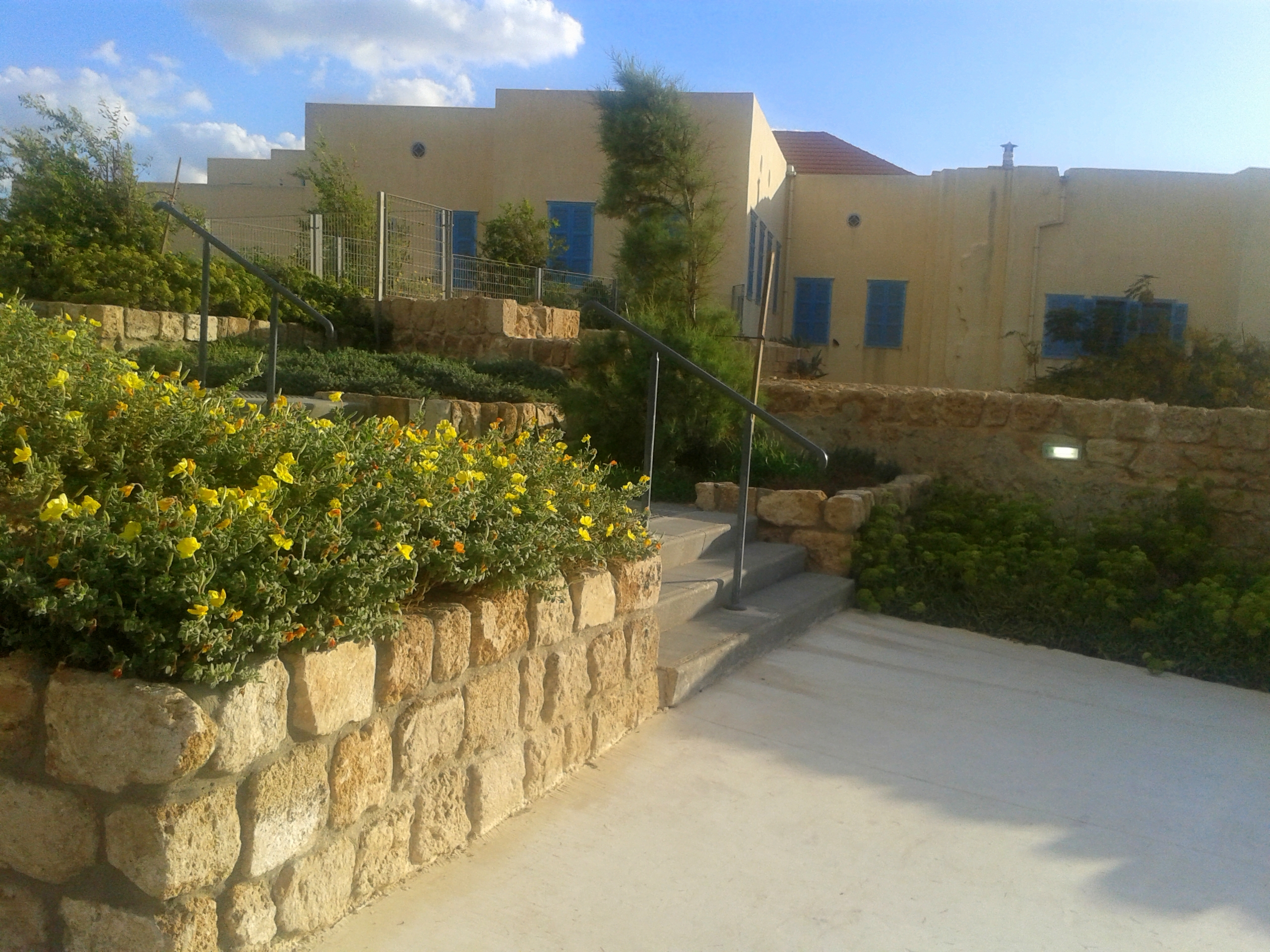 בית עבדאללה פאשה היה אחד מנכסיה של משפחת הבהאא אוללה, ונרכש על ידי עבדול בהאא על מנת לשכן בו את המשפחה המתרחבת וכדי לשמש כמקום להקביל בו את פניהם של עולי הרגל שהגיעו אל העיר. שמו של הבית בא משמו של אחד מבעליו הקודמים, עבדאללה פאשה מושל עכו בשנות העשרים של המאה ה-19. עבדול בהאא המשיך והתגורר במקום משך 13 שנים עד שעקר לחיפה, ובבנין זה הוחזקו שרידיו של הבאב בהיחבא, עד שהונחו במאוזוליאום שנבנה עבורו בחיפה ב-1909.